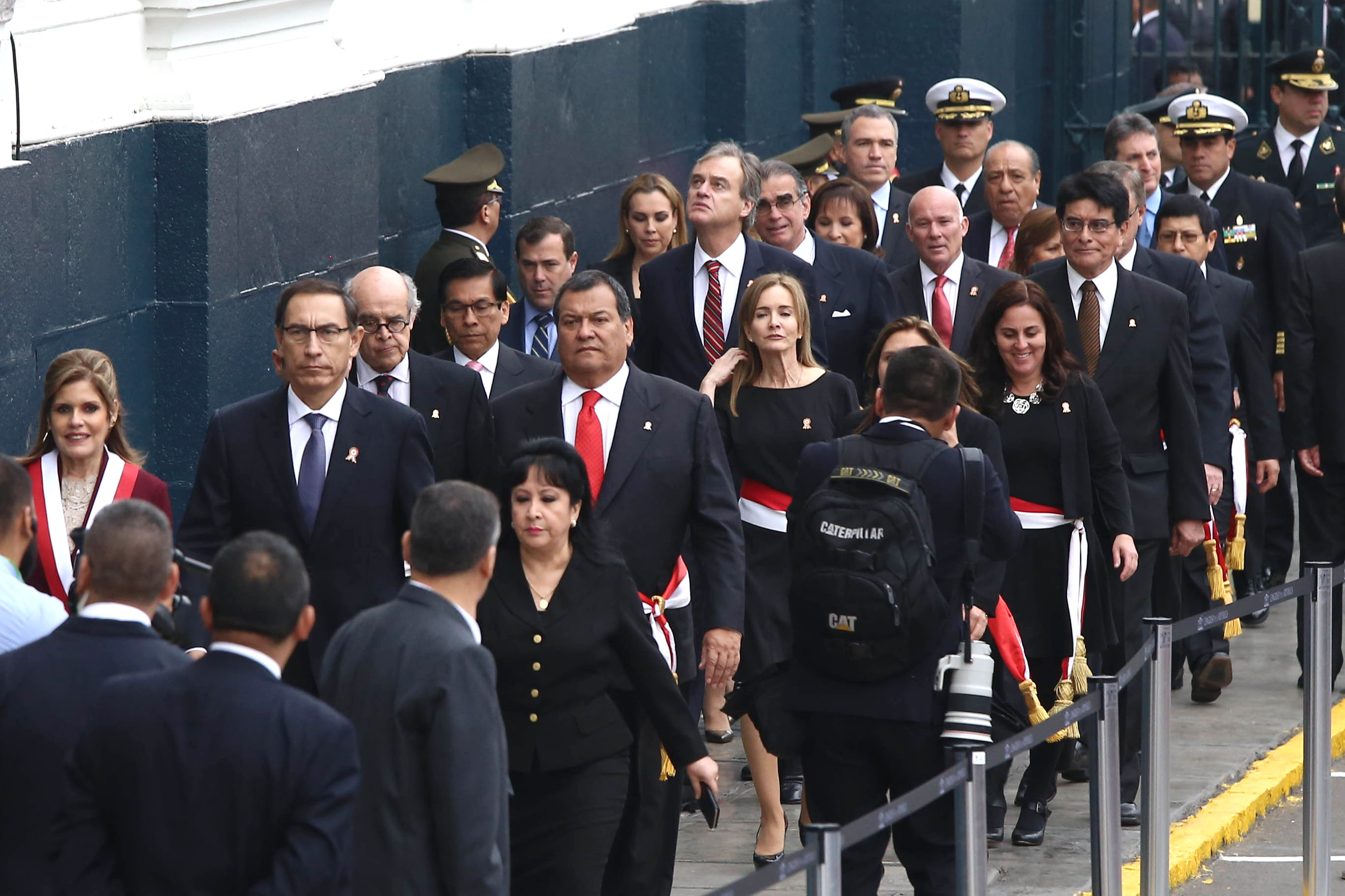 Un merecido y sentido homenaje rindió el presidente de la República, Pedro Pablo Kuczynski, al personal de las Fuerzas Armadas y del Centro de Operaciones de Emergencia Nacional (COEN), que se ubicaron en “primera fila” para atender a la población durante la emergencia causada por el fenómeno climático Niño Costero.